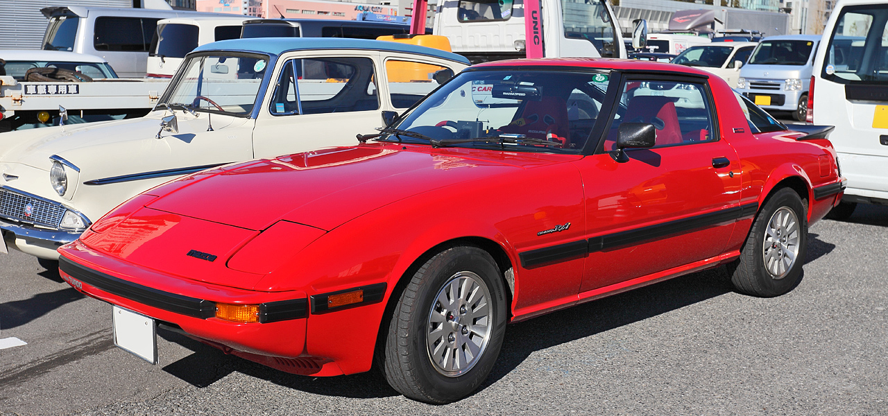 Mazda Savanna RX-7 Turbo (SA22C, Japan spec.)